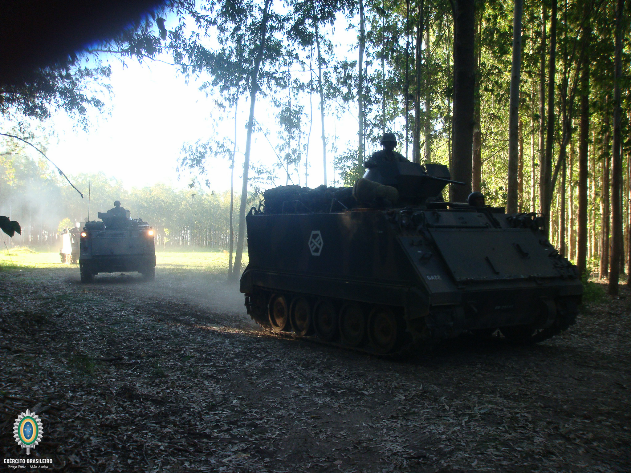 Cavalaria